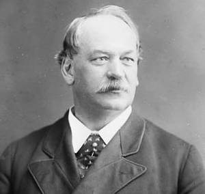 Fortin, Pierre Dr. M.P. (Gaspe, P.Q.) Dec. 1823 - 1888